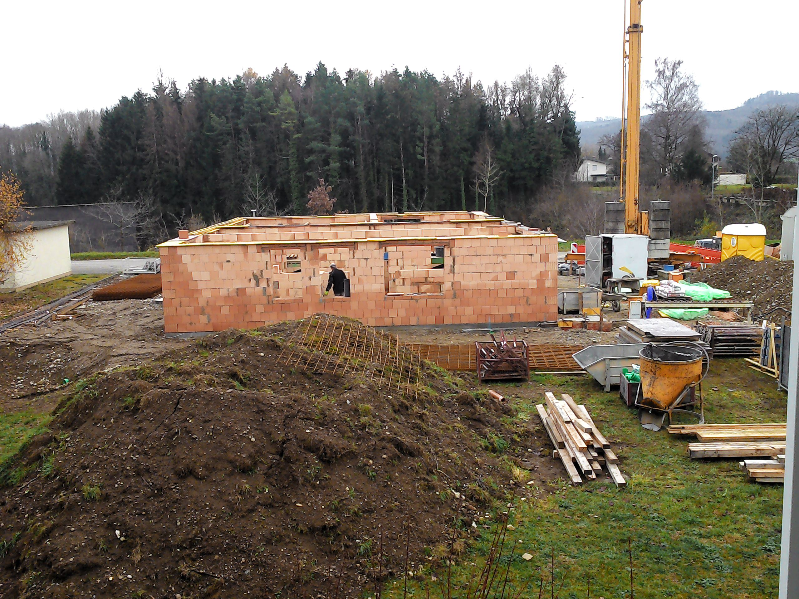 Küssaberg, Gemeinde im Landkreis Waldshut in Baden-Württemberg: Ortschaft Rheinheim, Hausbau der Gemeinde für Flüchtlinge.